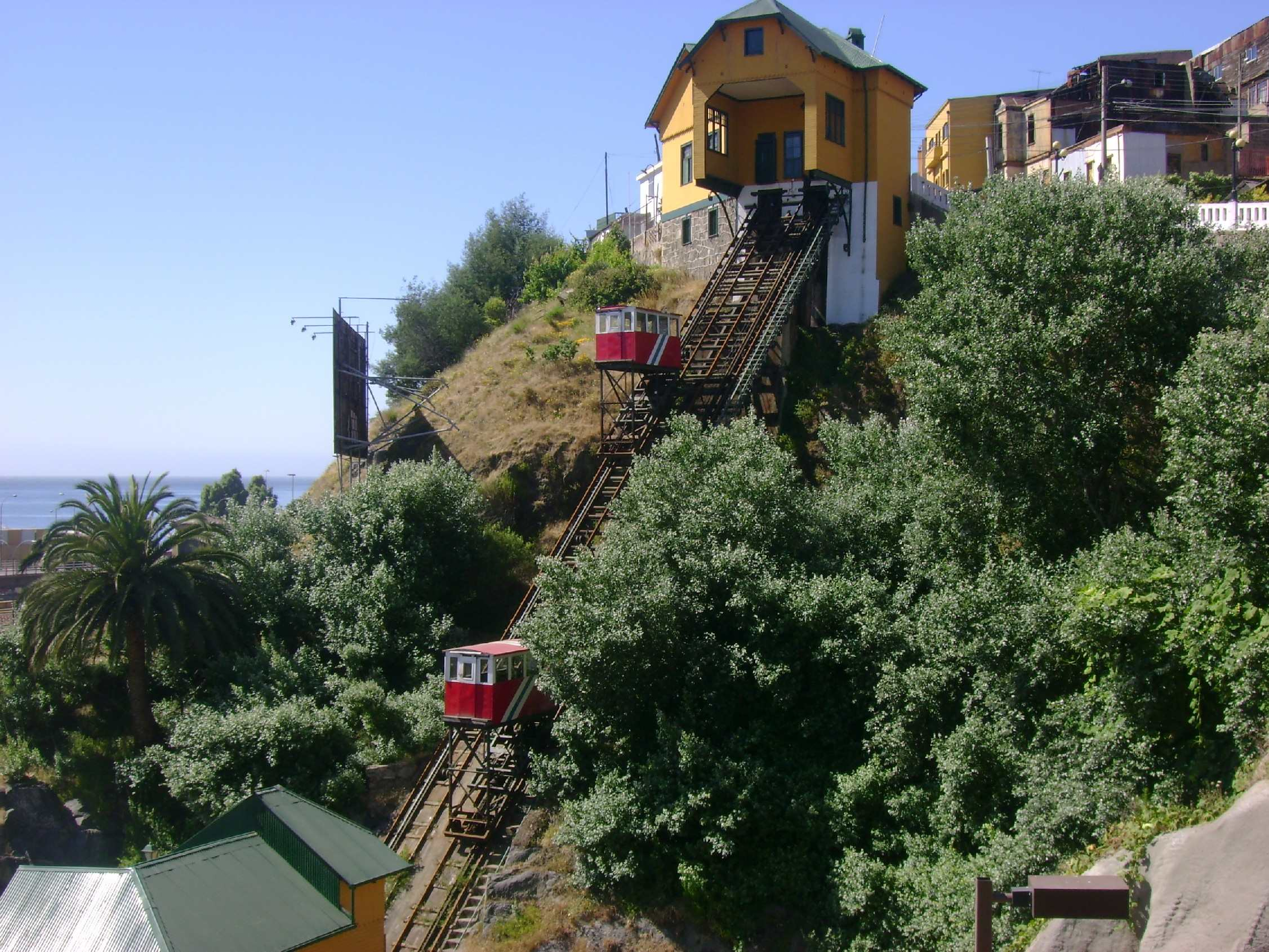 Ascensor Barón This is a photo of a national monument in Chile: 766